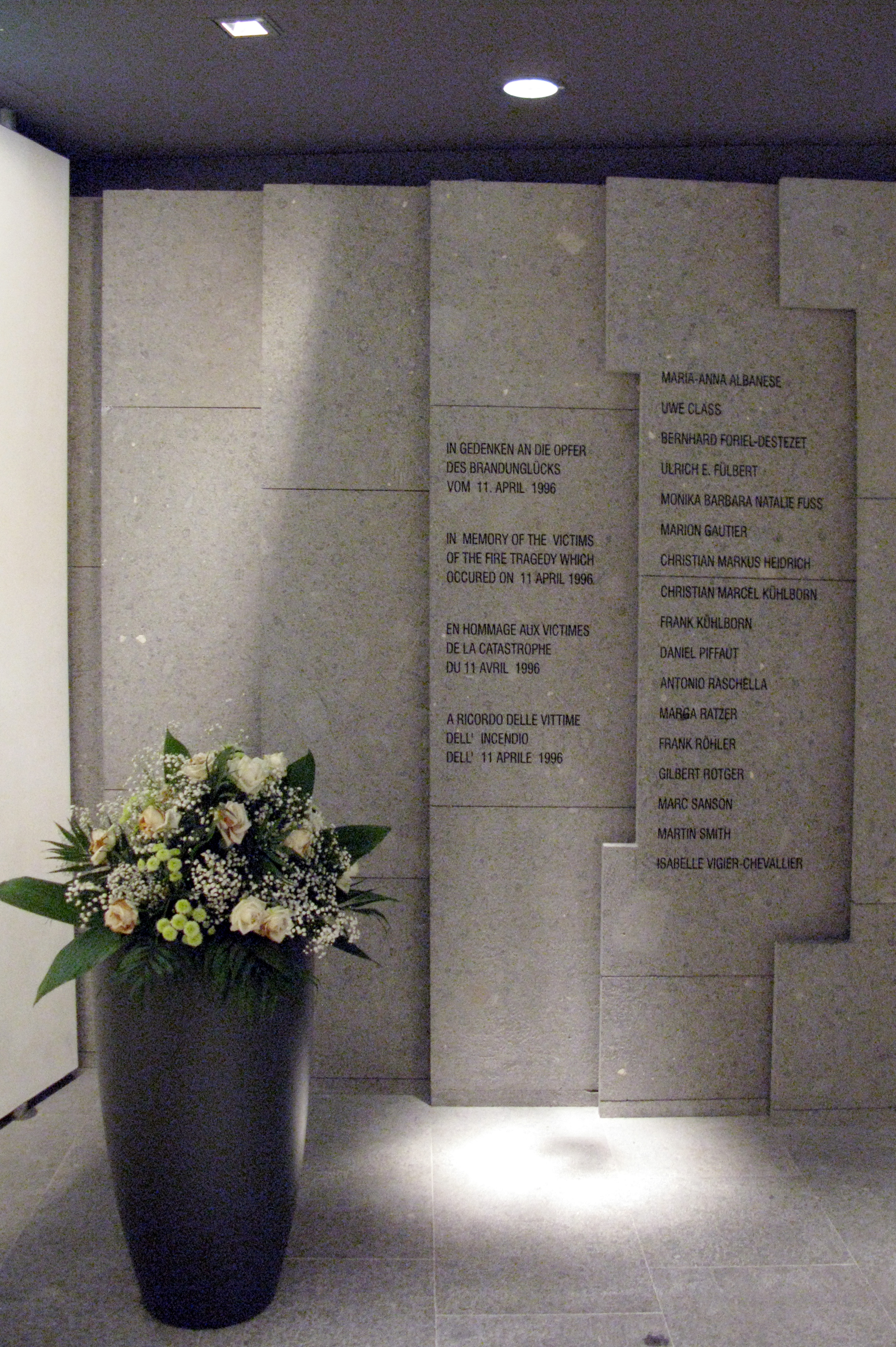 Gedenkraum im Flughafen Düsseldorf, Inschrift zur Brandkatastrophe 1996